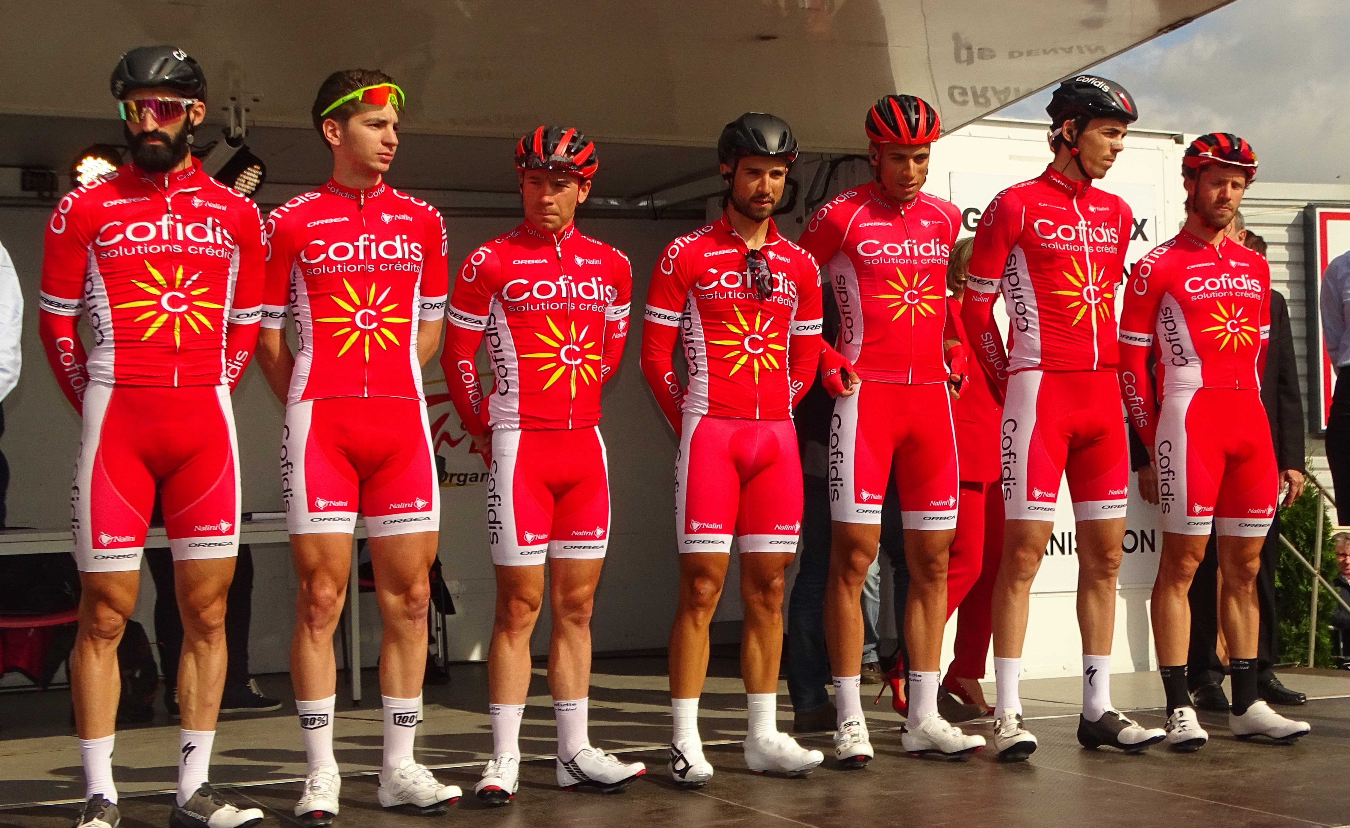 Reportage réalisé le jeudi 13 avril à l'occasion du départ et de l'arrivée du Grand Prix de Denain 2017 à Denain, Nord, Nord-Pas-de-Calais-Picardie, France.